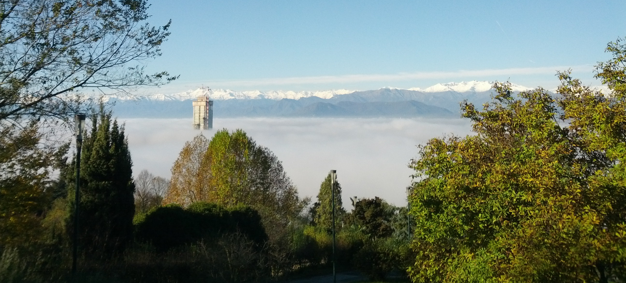 Foto scattata dal Parco Europa durante una giornata intensamente nebbiosa.